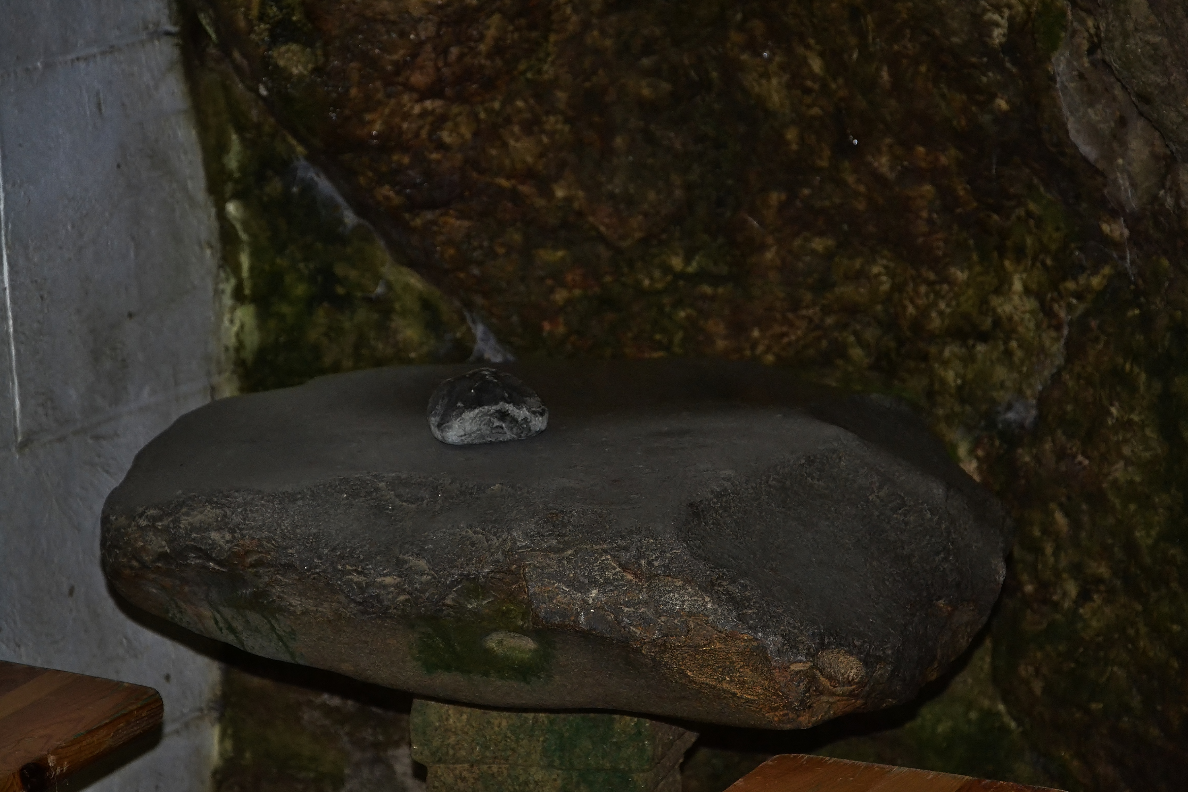 Pierre sonnante dans la nef de la chapelle Saint-Gildas de Bieuzy